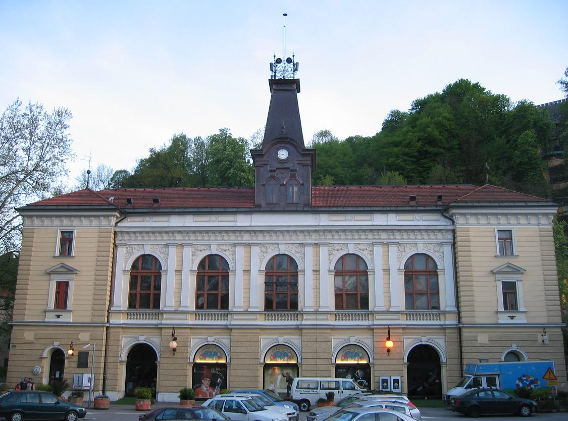 Mestni dom and Krek square, Ljubljana photo:Ziga 13:12, 14 May 2006 (UTC)